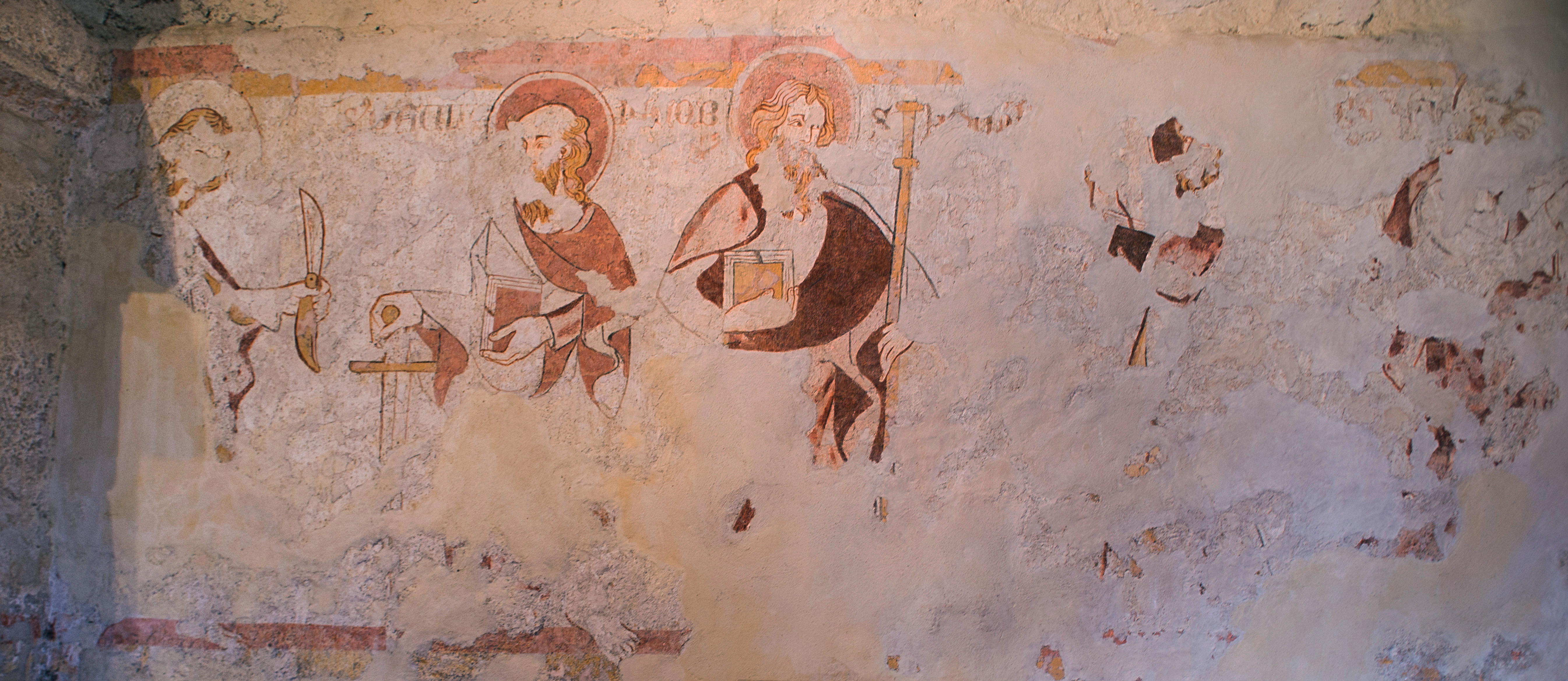 Fresque présente sur le mur nord du clocher roman d'Annecy-le-Vieux; "redécouverte" lors de travaux réalisés en 1988, elle date de la seconde moitié du 15e siècle. Elle représentait les 12 apôtres, mais seuls les 3 les plus à gauche sont reconnaissables aujourd'hui: St Barthélémy, St Paul, St Jacques